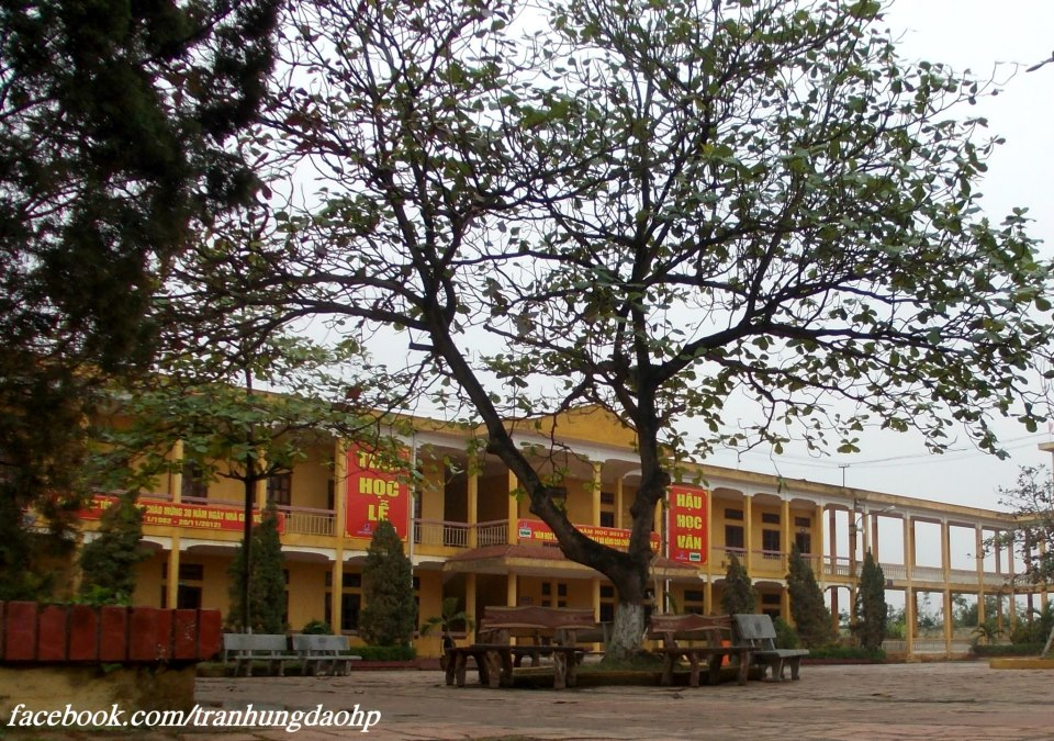 Một góc sân trường THPT Trần Hưng Đạo, Hải Phòng mùa đông